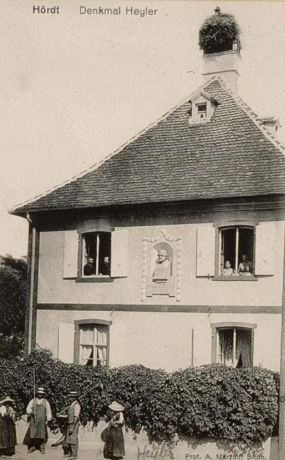 Heyler Denkmal, Hœrdt, (18??). 1880. Bibliothèque nationale et universitaire de Strasbourg